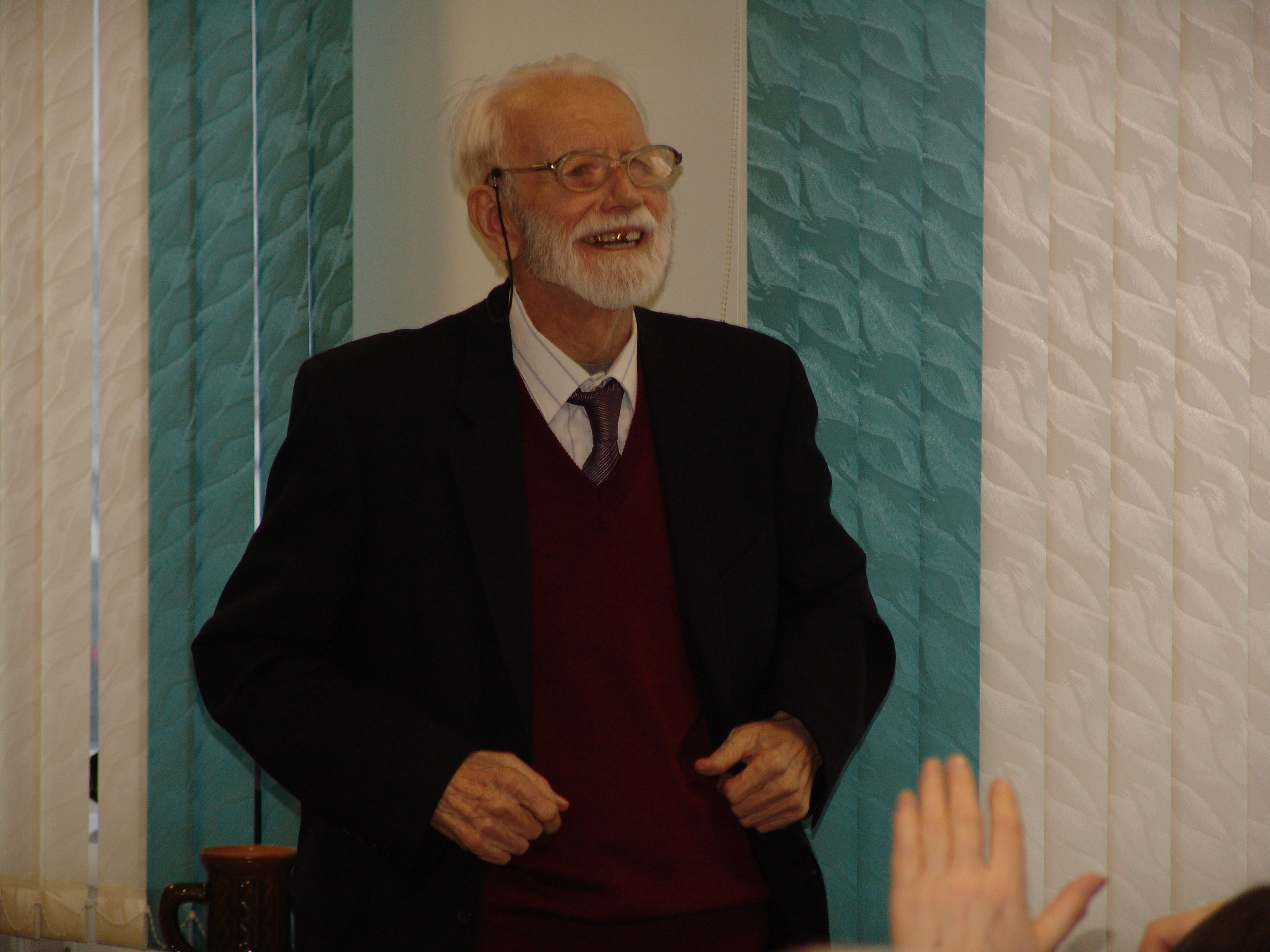 Беларуская (тарашкевіца): Сьвяткаваньне 95-гадовага юбілею М. Аўрамчыка, 22.01.15